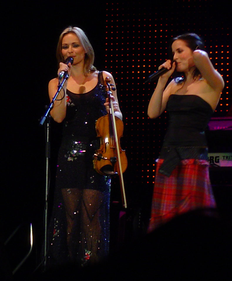 Sharon et Andrea Corr lors du concert du 20 octobre 2004 à Stuttgart